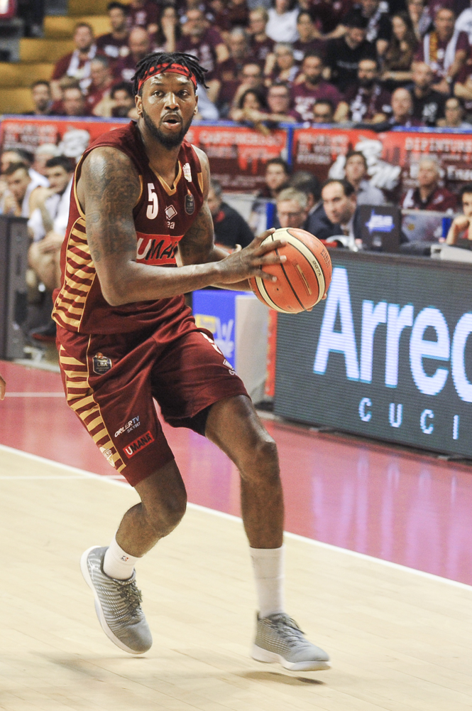 Julyan Stone con la maglia della Reyer Venezia